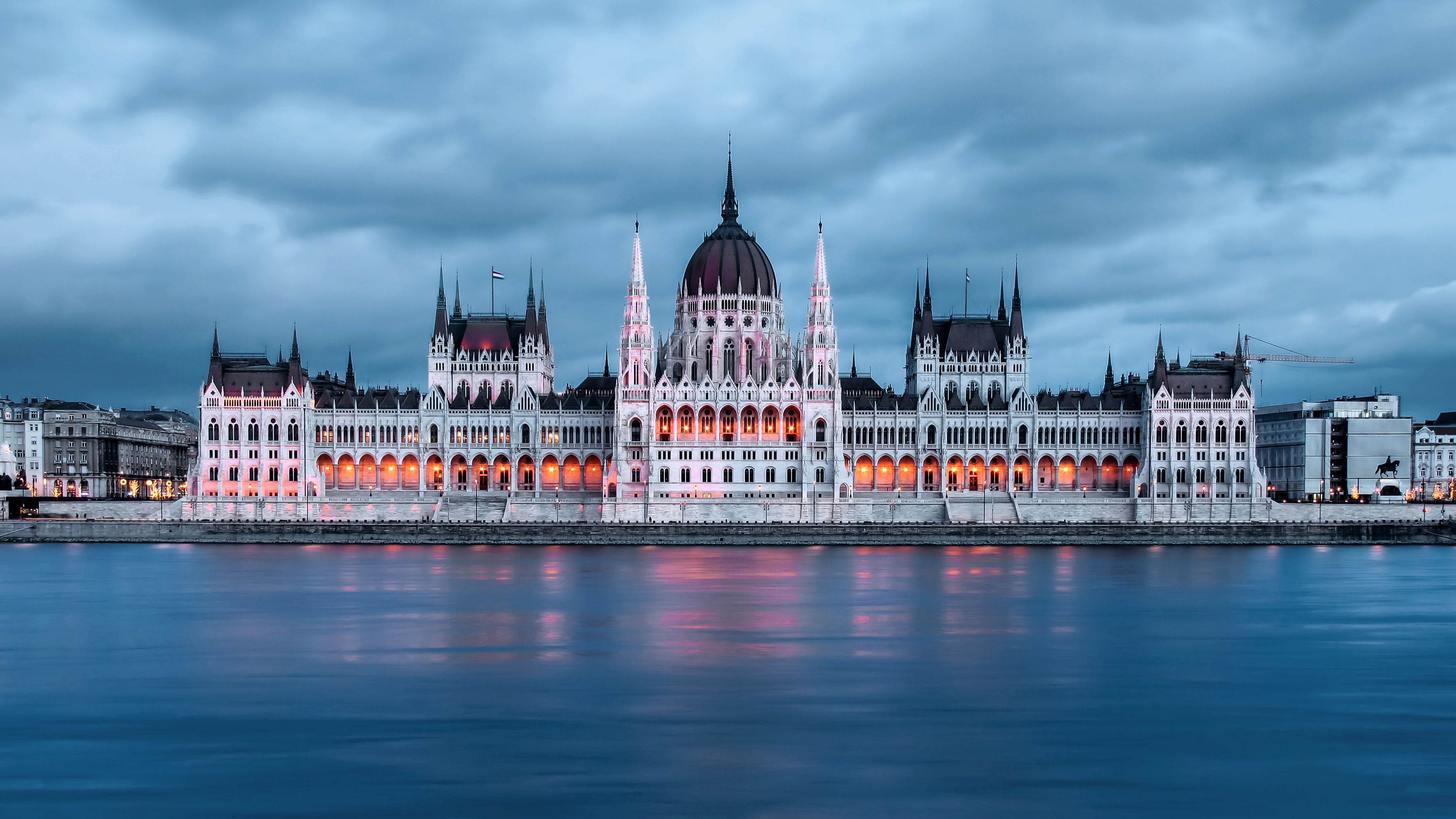 Hungarian Parliament Building (Budapest, Hungary)